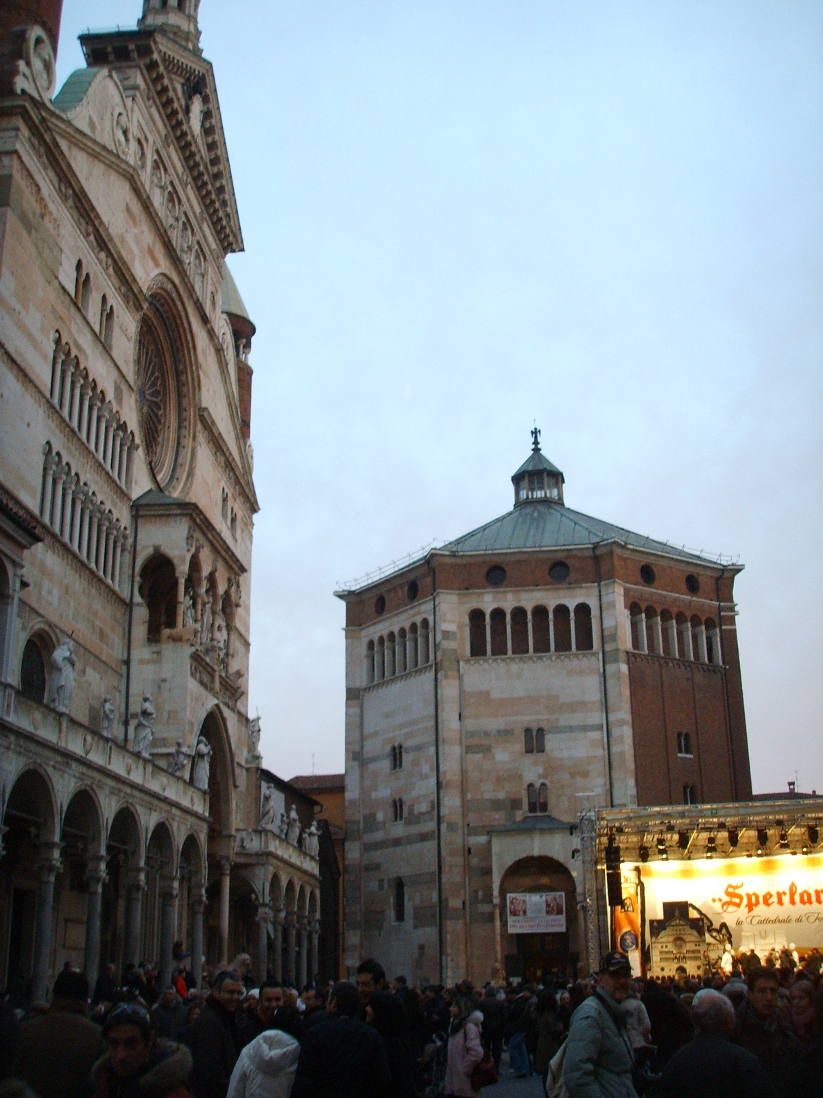 Cremona, battistero